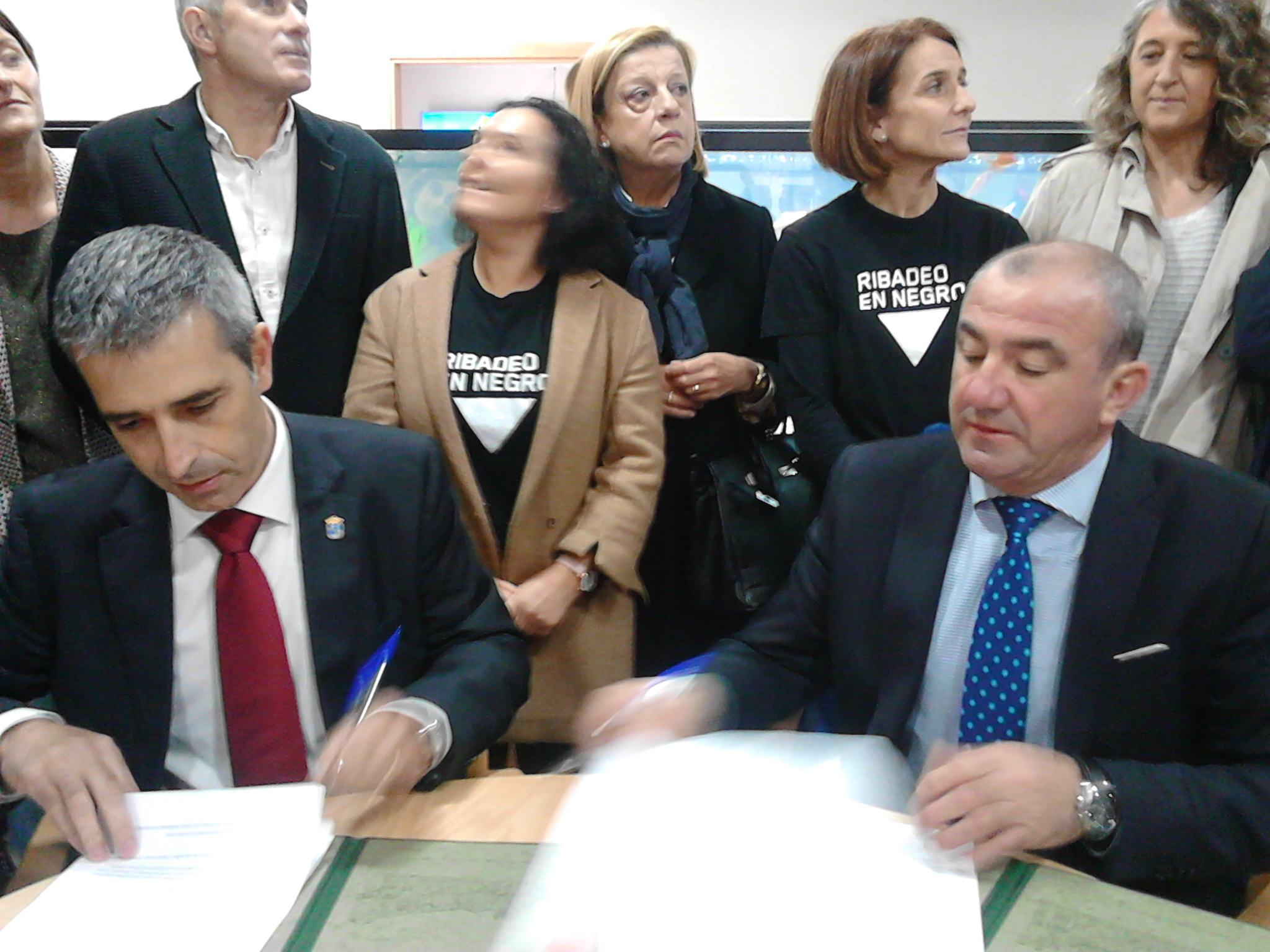 Fernando Suárez Barcia e Darío Campos Conde asinando a petición do PIA para a residencia de maiores de Ribadeo